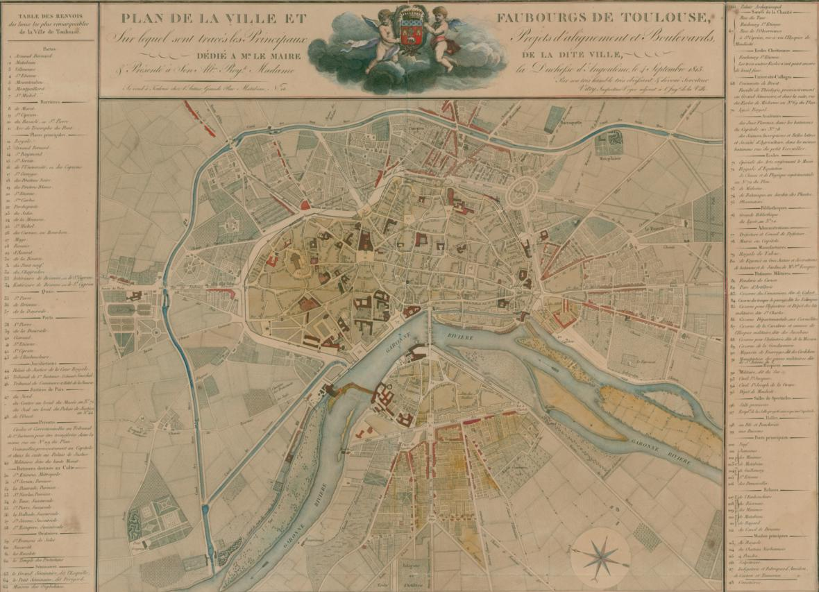 Carte de Toulouse et de ses faubourgs datant de 1815